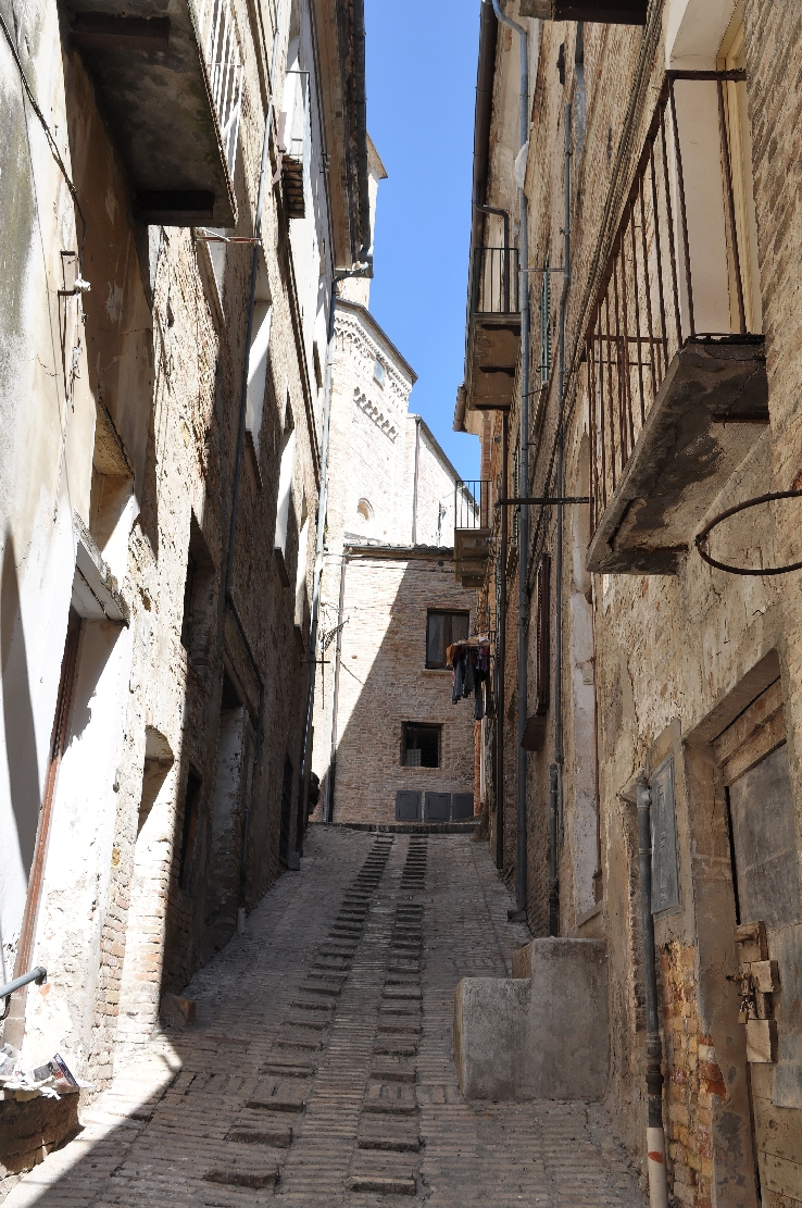 Penne (comune, Italy) 2012